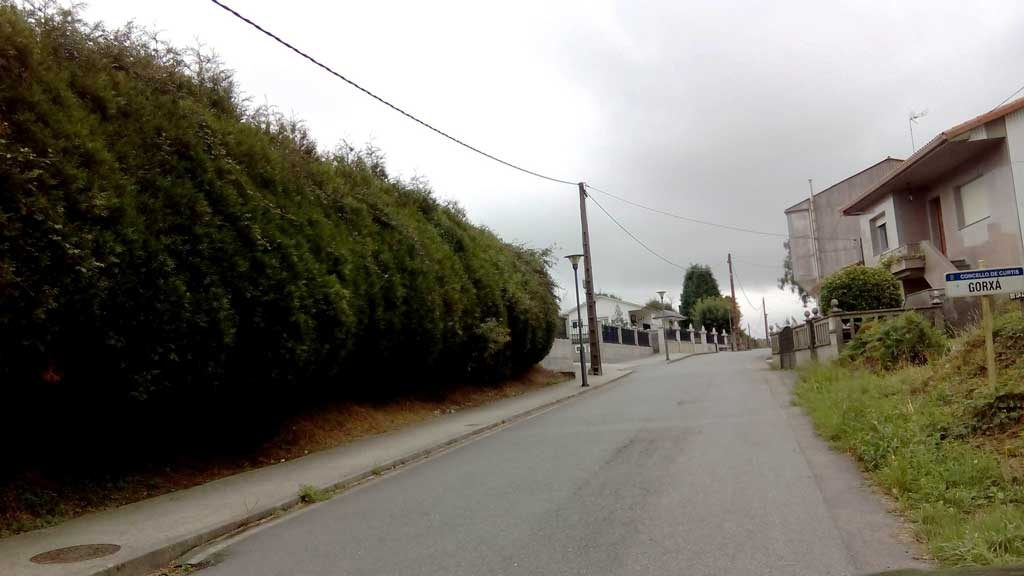 Vista de Gorxá, Curtis.